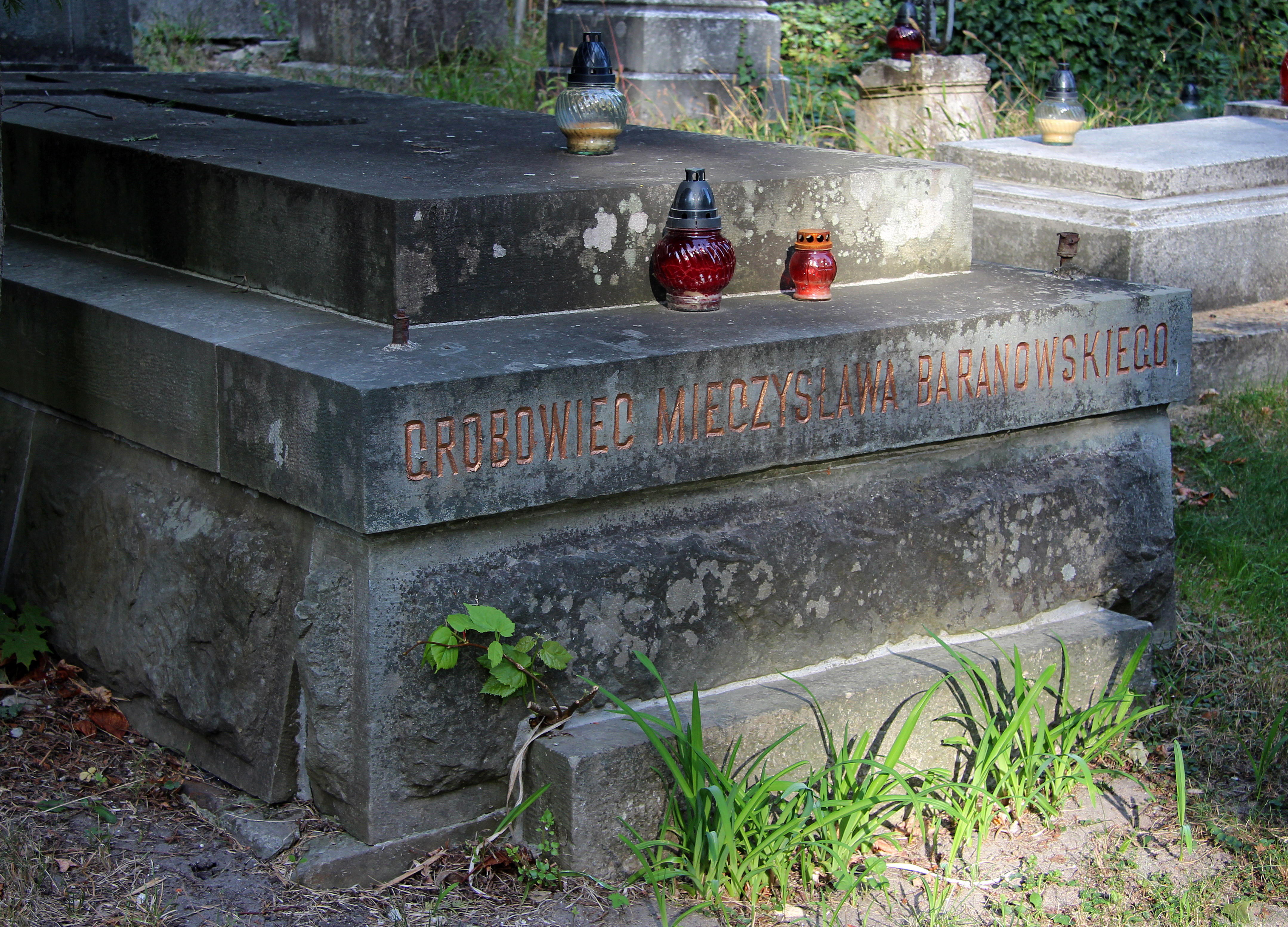 Гробівець родини Барановських. Лмчаківський цвинтар , поле № 22.